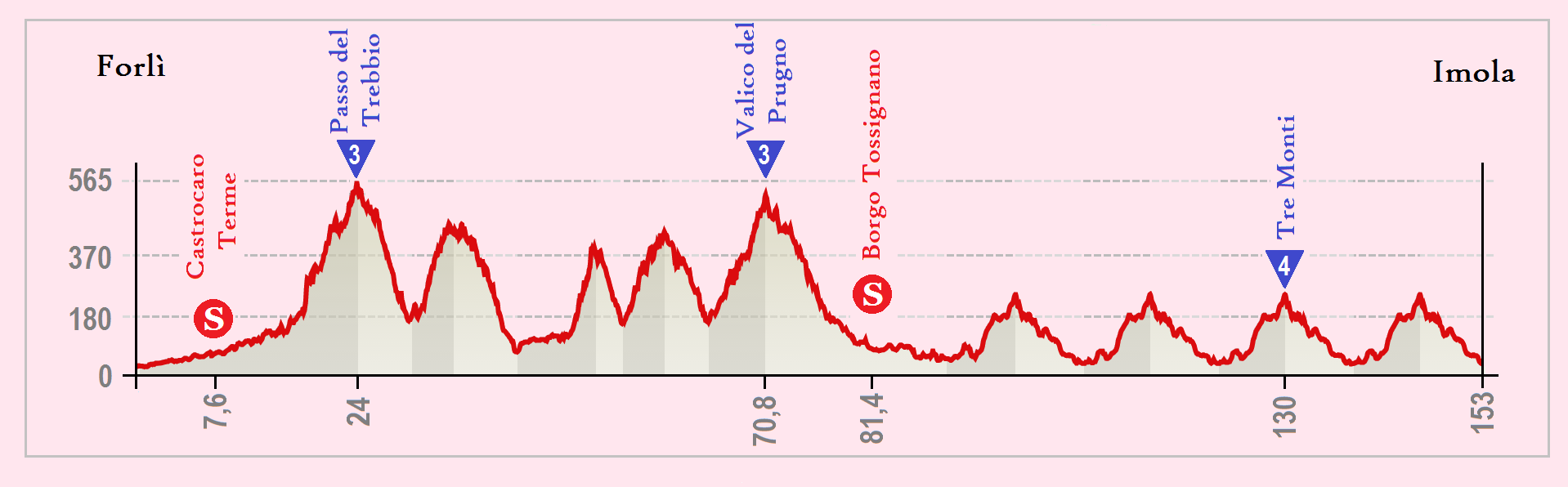 Perfil de la 11.º etapa del Giro de Italia 2015